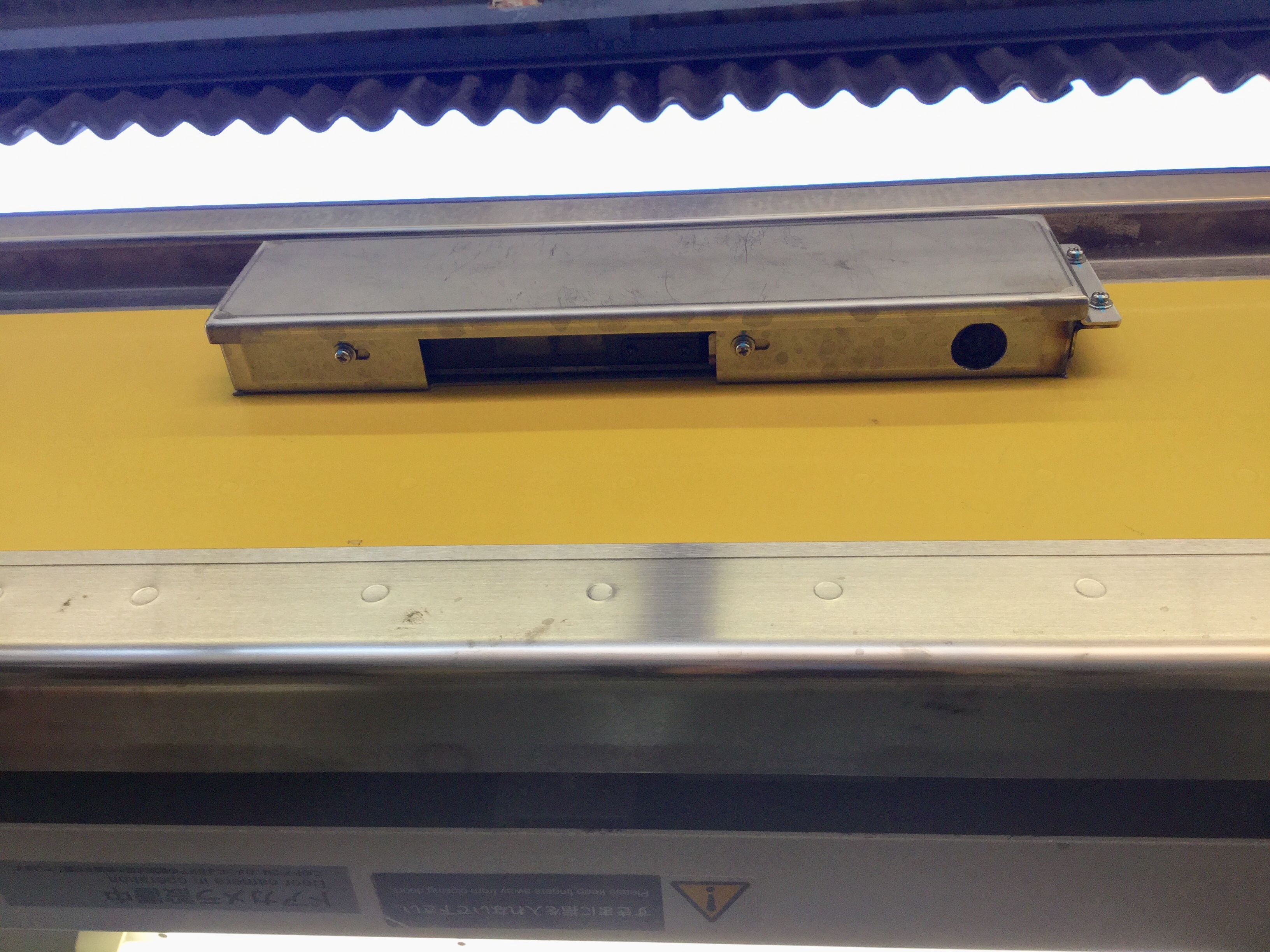 E231系B82編成の2号車「サハE231-223」についているドアカメラ。